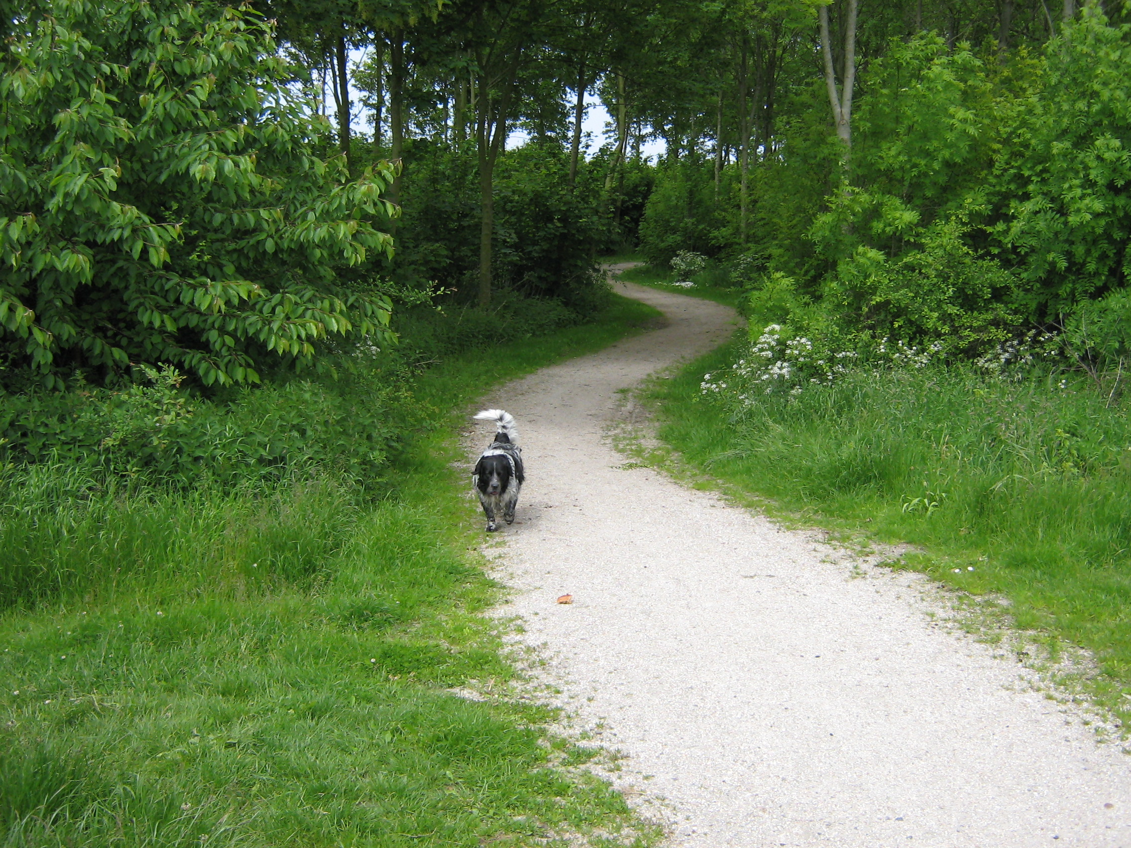 Gemaakt door Sjoerd Wiersma, zomer 2006. Eigen werk.